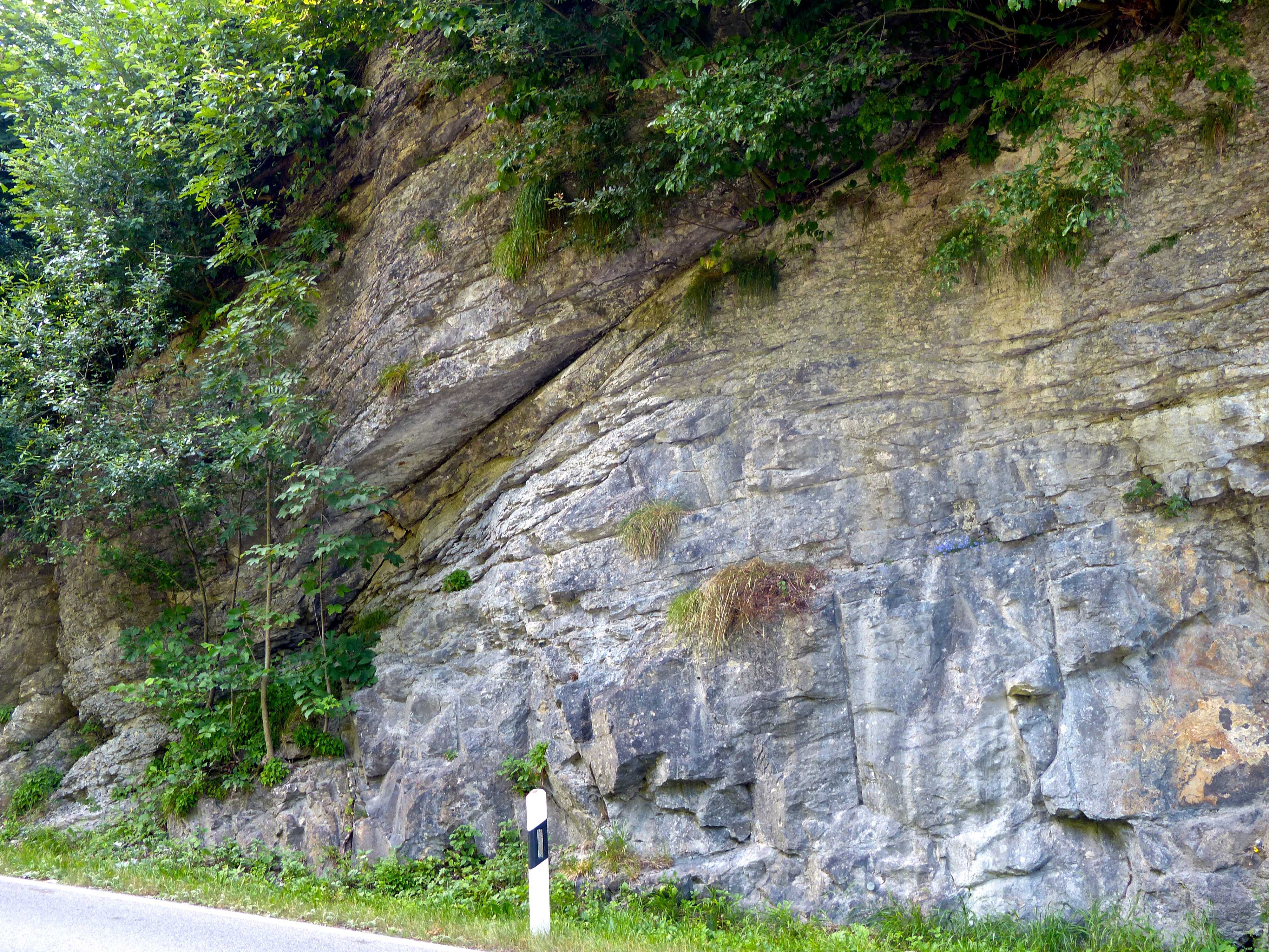 WikiProjekt Landstreiche:r Geotop Helvetikumaufschluss an der Breitachstraße